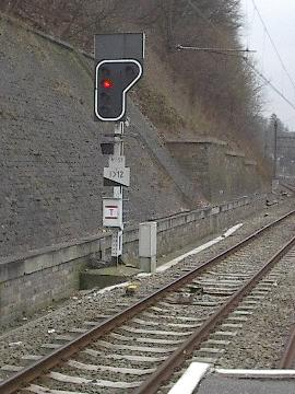 NMBS-sein te Verviers, eigen foto